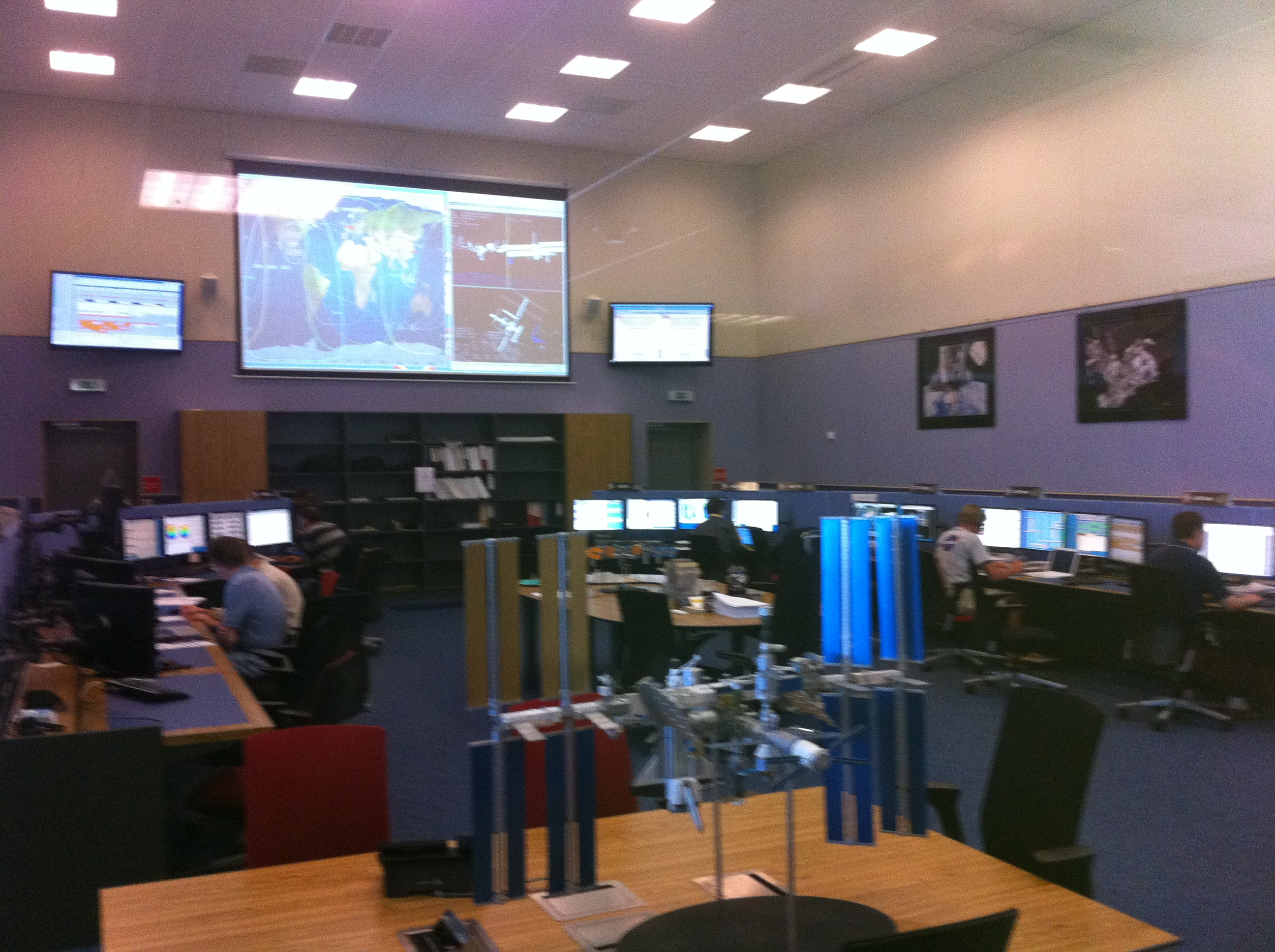 חדר הבקרה של הAMS 02 בCERN